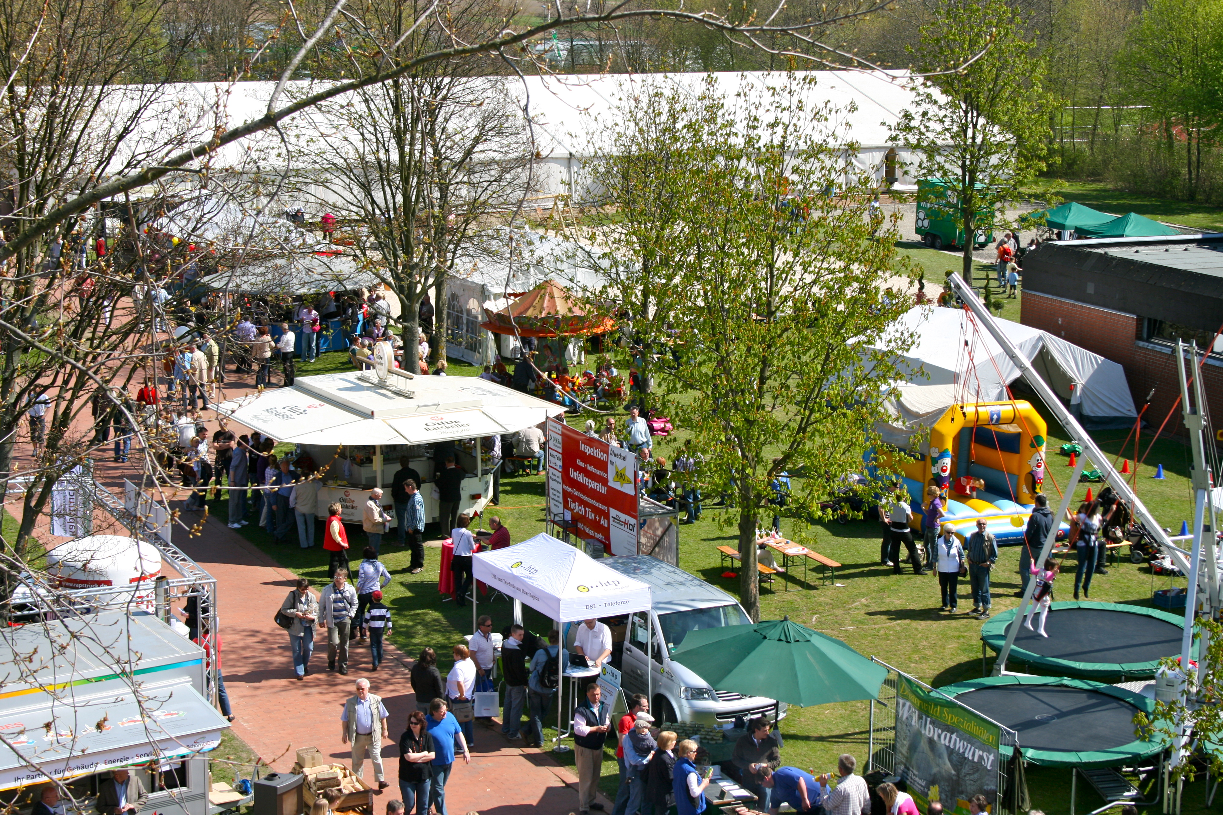 Gewerbeschau 2010 in Wennigsen (Deister)